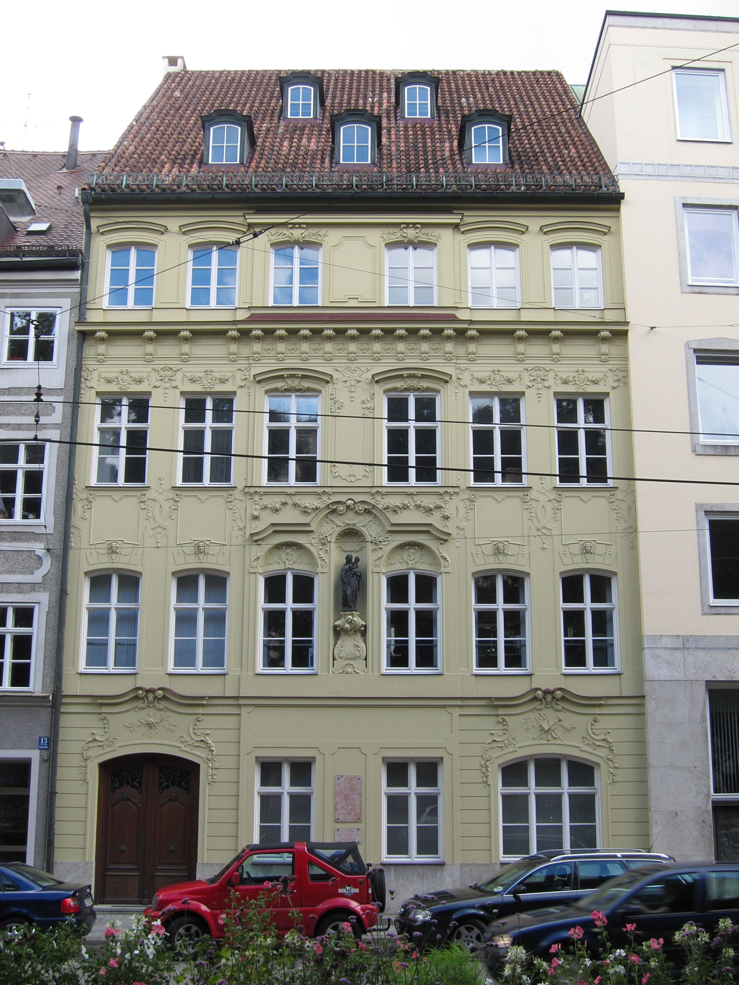 Promenadeplatz 15; Sog. Gunetzrhainer- oder Ostermaierhaus, reich stuckierte Fassade, um 1730 von Johann Baptist Gunetzrhainer als eigenes Wohnhaus erbaut; nach Kriegszerstörung rekonstruiert; jetzt zur Deutschen Bank gehörig.